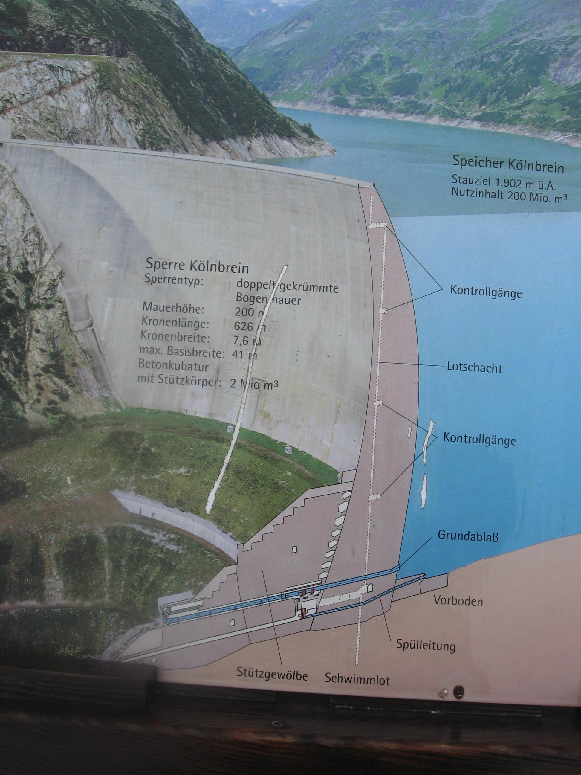 Fotografie einer unter Panoramafreiheit fallenden Tafel in der Nähe der Sperre Kölnbrein (Österreich) der Maltakraftwerke. Die Tafel trägt die Überschrift „Die Überwachung von Talsperren“.